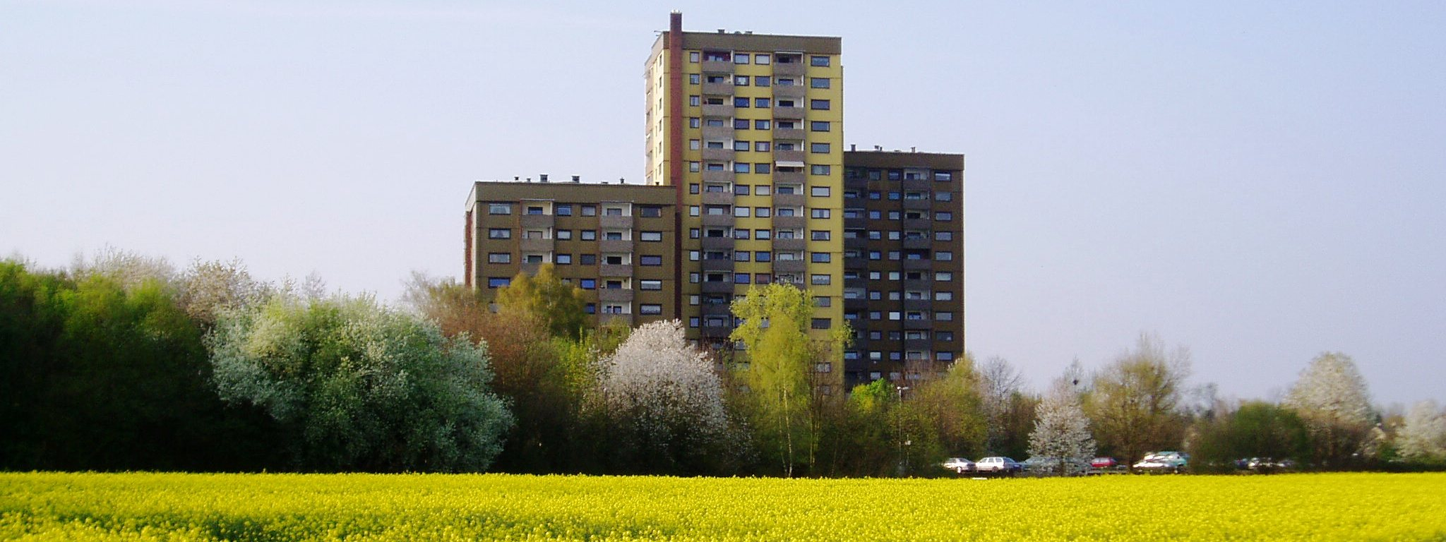 Köln-Brück - Hochhaus Hans-Schultenstr. mit Rapsfeld im Vordergrund (Panorama für Infobox)